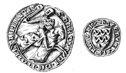 Sceau et contre-sceau d'Hardouin V de Maillé.